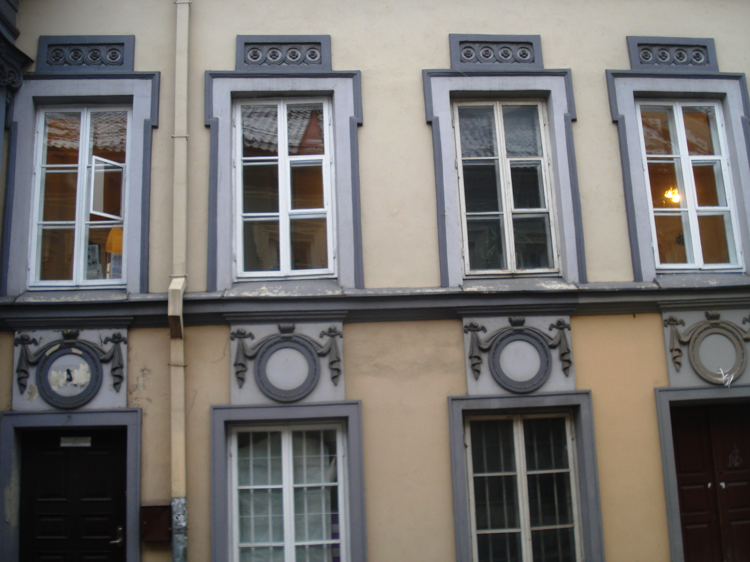 Дворец Гурецких. Вильнюс, Доминикону 15 / Гаоно 1